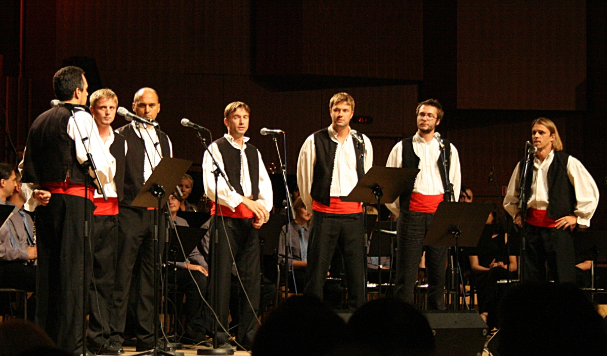 Dobrotvorni koncert "Križ nek' ti sačuva ime" u koncertnoj dvorani Vatroslav Lisinski u Zagrebu.